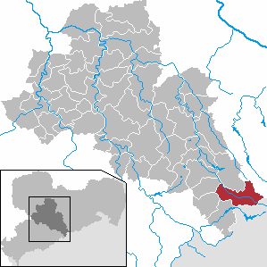 Rechenberg-Bienenmühle in Saxony - district Mittelsachsen